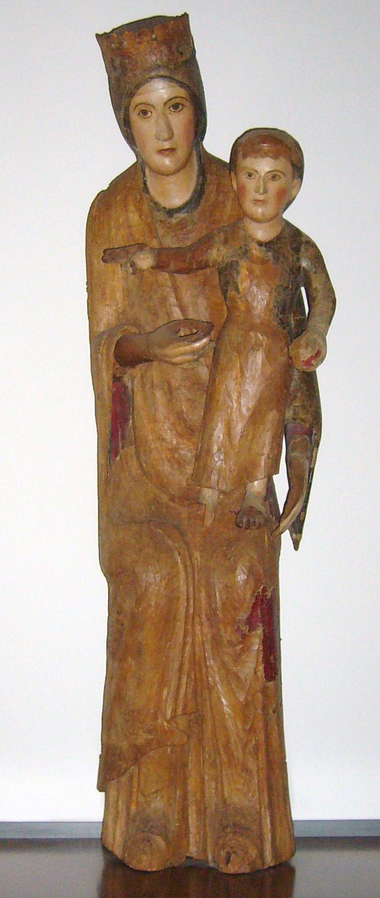 Madonna rosa- scultura lignea- museo civico Palazzo Santi, Cascia